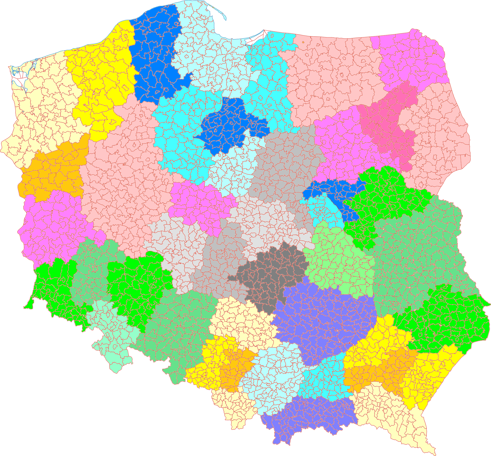 Mapa właściwości miejscowej sądów okręgowych w Polsce (stan na 16 XII 2017 r.). PS: autorem grafiki z podziałem Polski na gminy jest użytkownik Aotearoa. PS2: oryginalna mapa autorstwa Aotearoy nie zawierała podziału Warszawy na dzielnice, stąd musiałem wskazać bieg Wisły sam, jednak zrobiłem to bardzo nieudolnie, za co przepraszam z góry :)